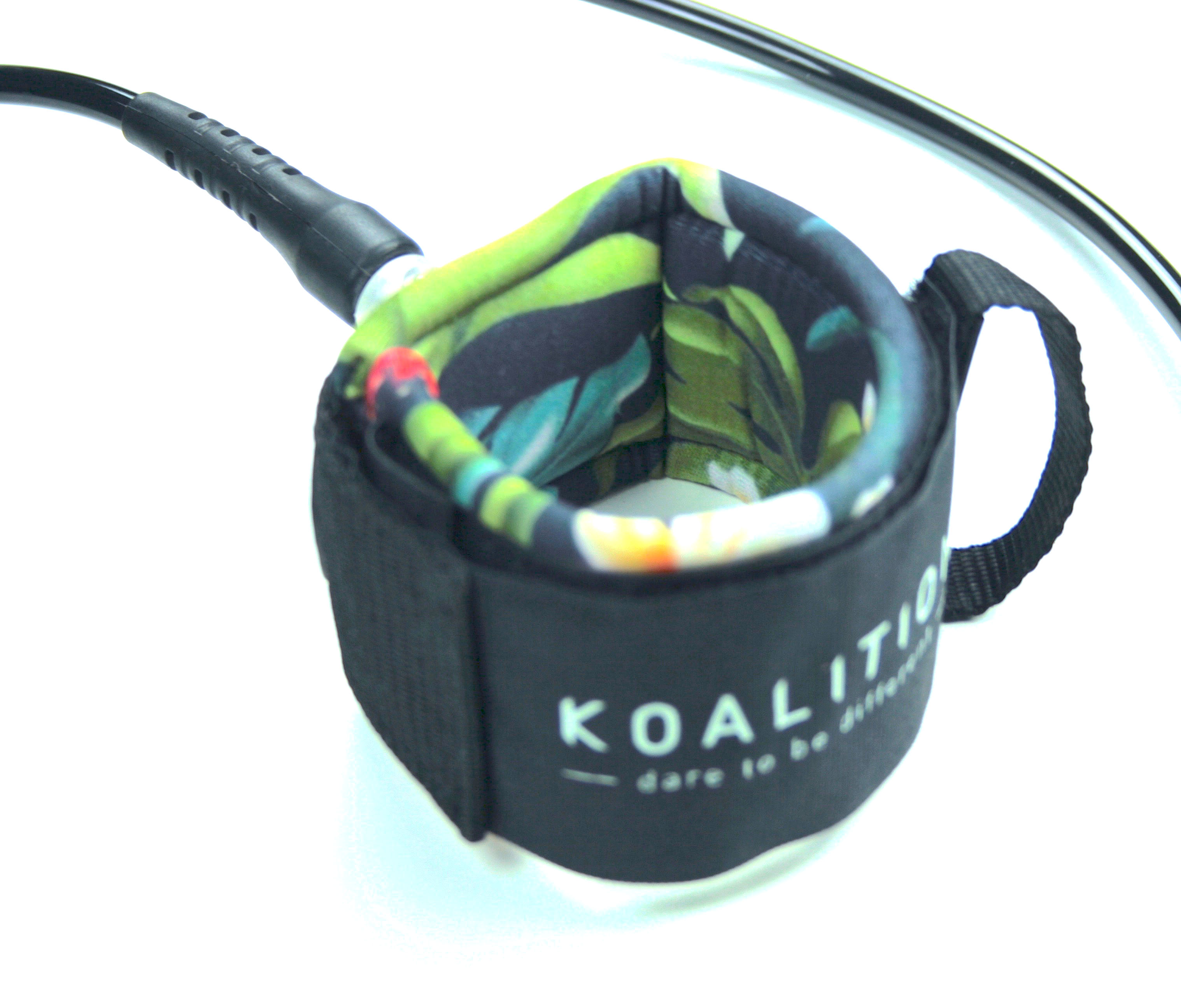 Bracelet néoprène d'un leash de surf sur lequel est cousu une sangle ainsi que le velcro